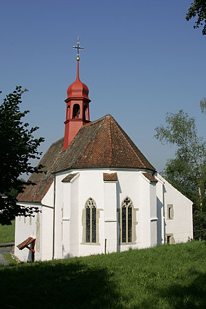 Sakramentskapelle in Ettiswil